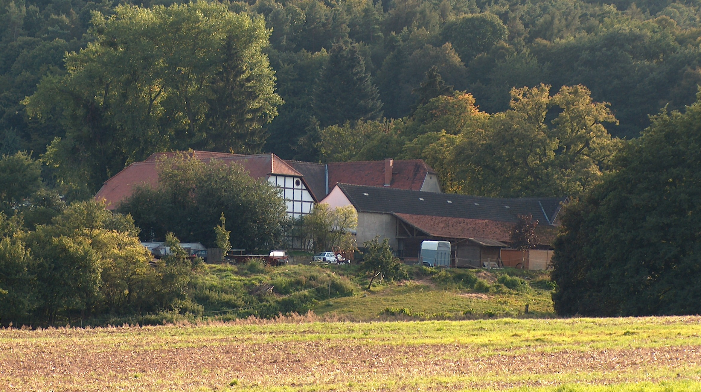 en.: Excursion local Gimbacher Hof at Kelkheim, Germany. dt.: Ausflugslokal Gimbacher Hof in Kelkheim, Hessen.